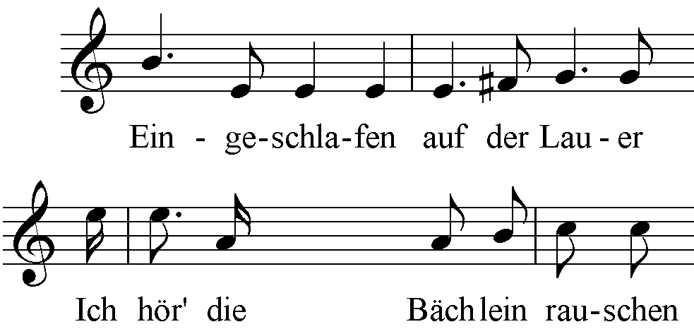 Comparision of Robert Schumann's Songs "Auf einer Burg" and "In der Fremde" (from Liederkreis op. 39)